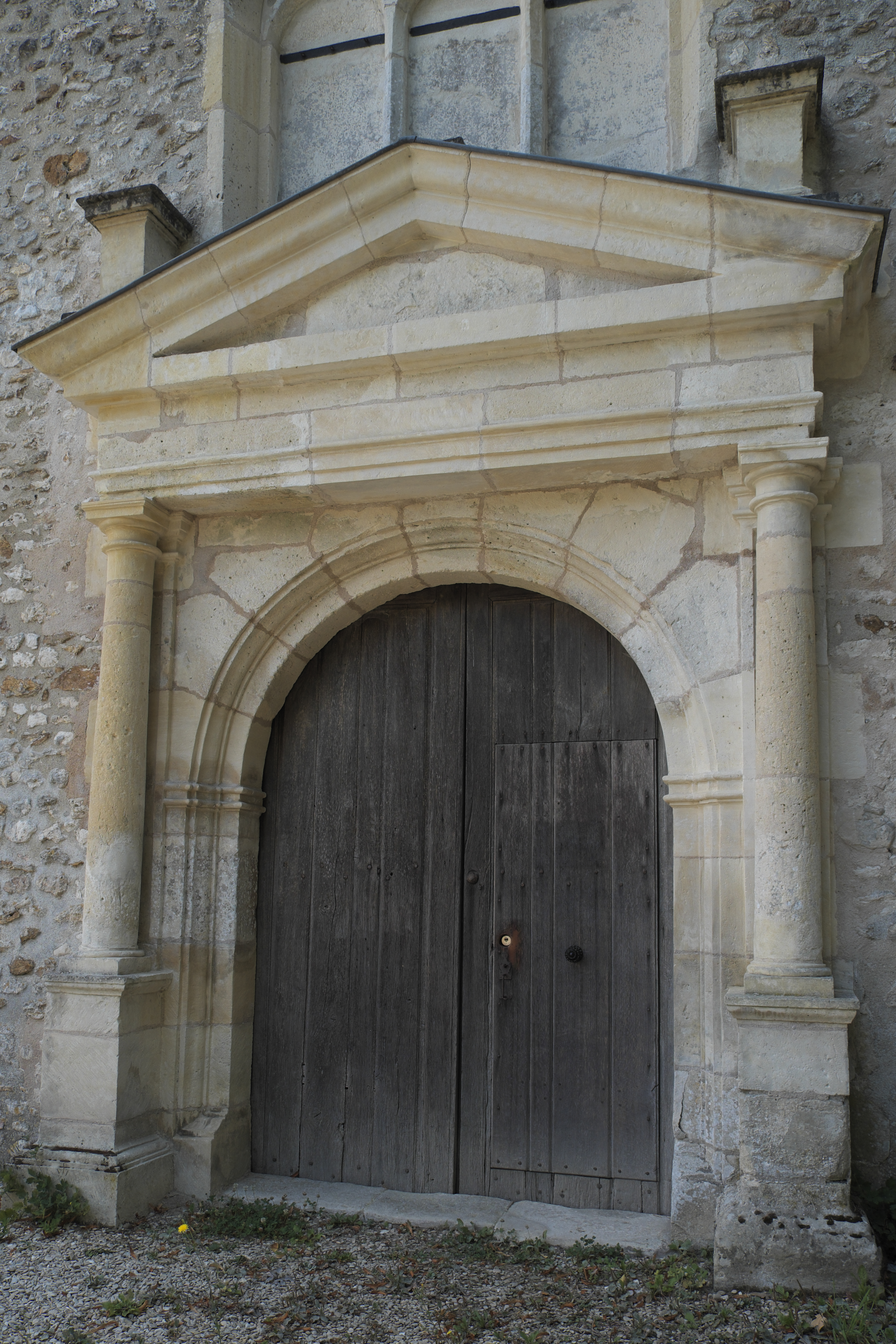 Kirche Sainte-Osmanne in Féricy im Département Seine-et-Marne (Île-de-France/Frankreich), Portal